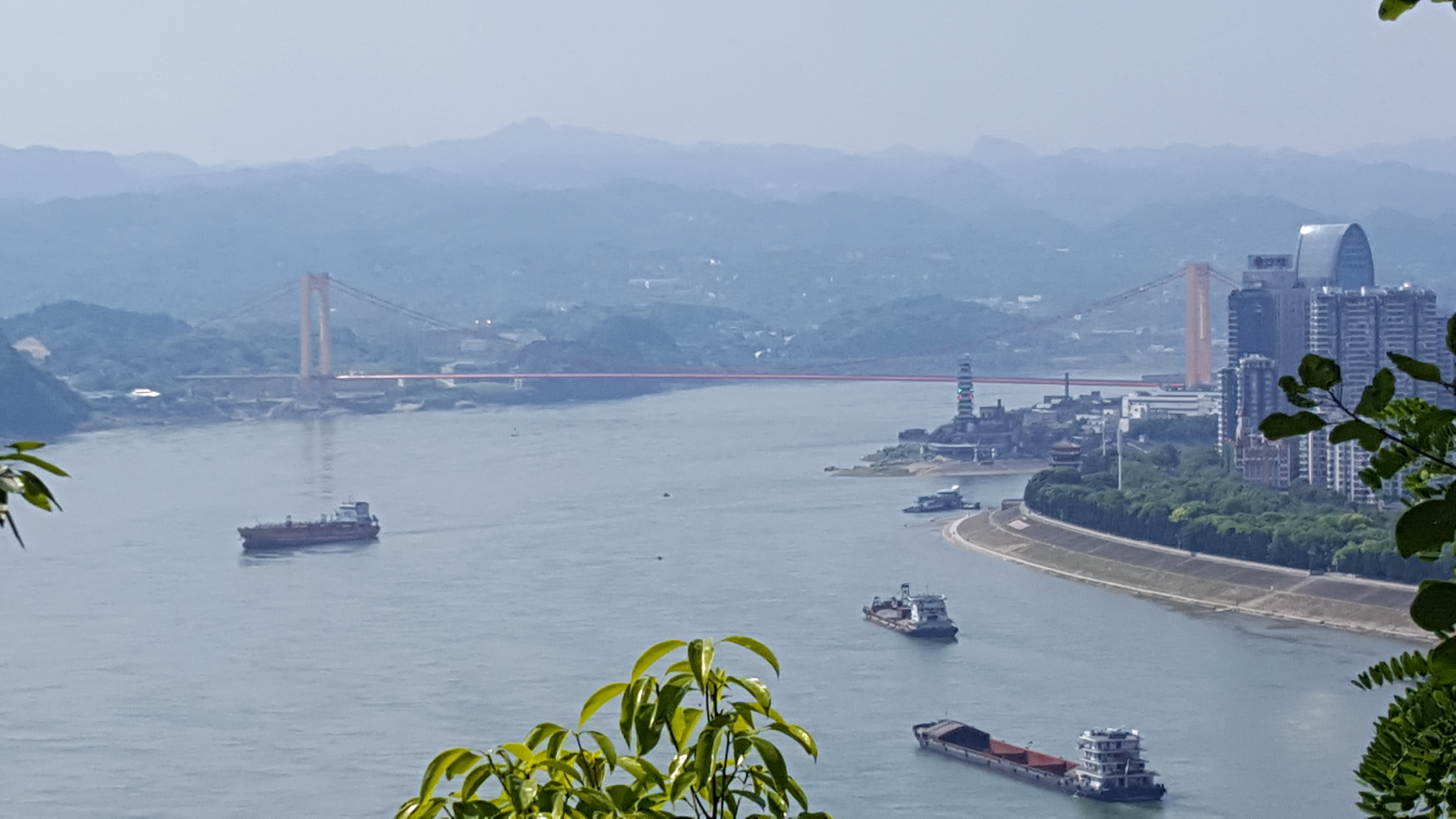 中文（中国大陆）: 宜昌市至喜长江大桥